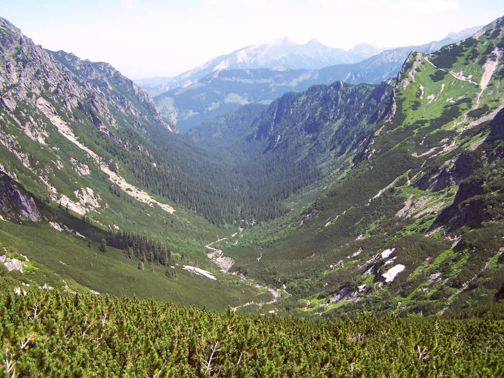 Dolina Roztoki (Tatra Mountains)